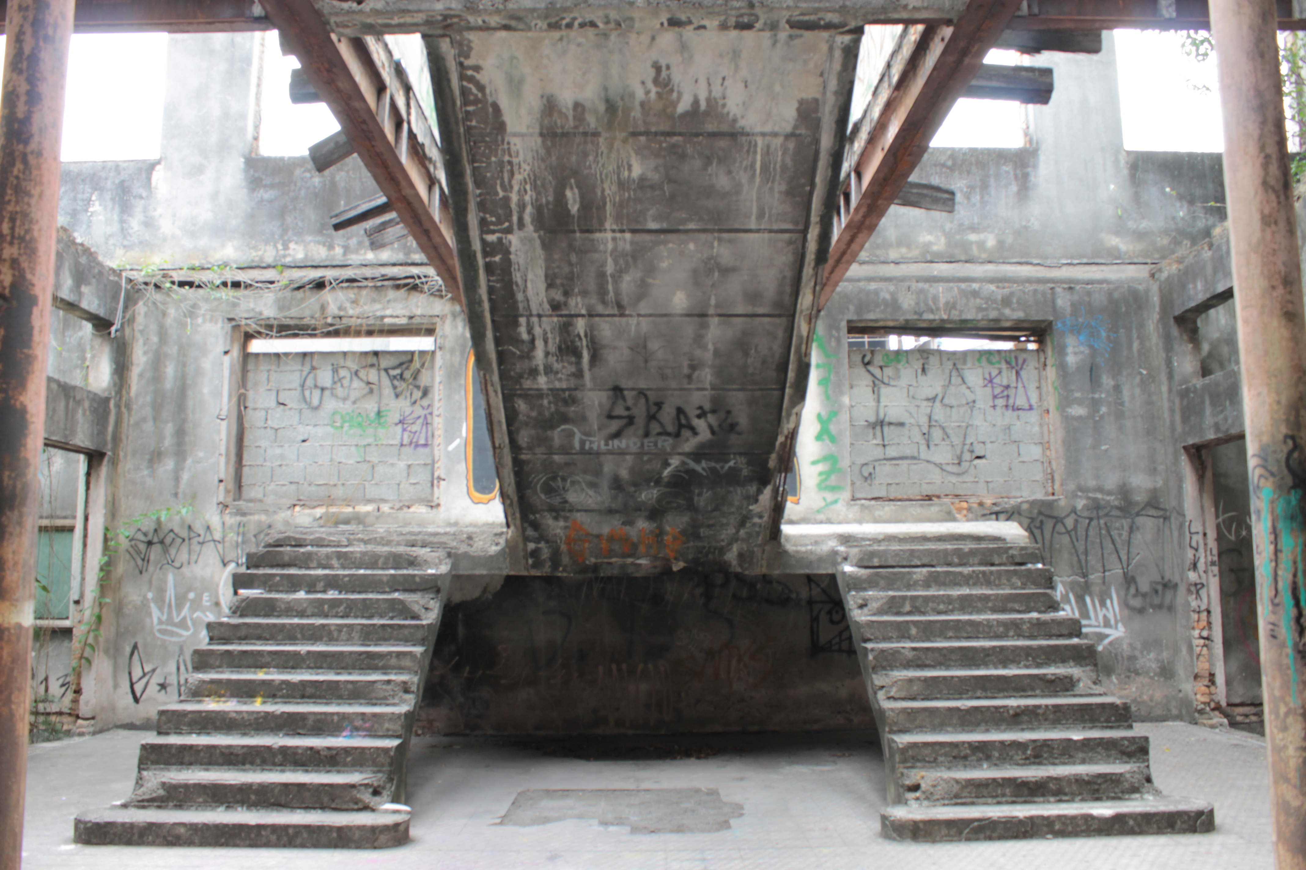 Escadaria que levava ao piso superior da Escola de Meninas. Antigamente, ela era feito de Mármore Carrara.